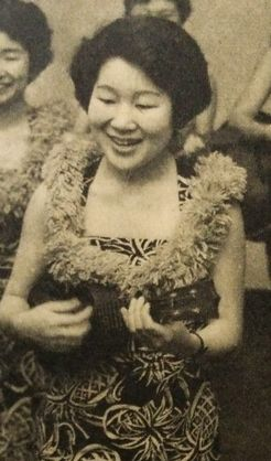 ハワイアン歌手、エセル中田